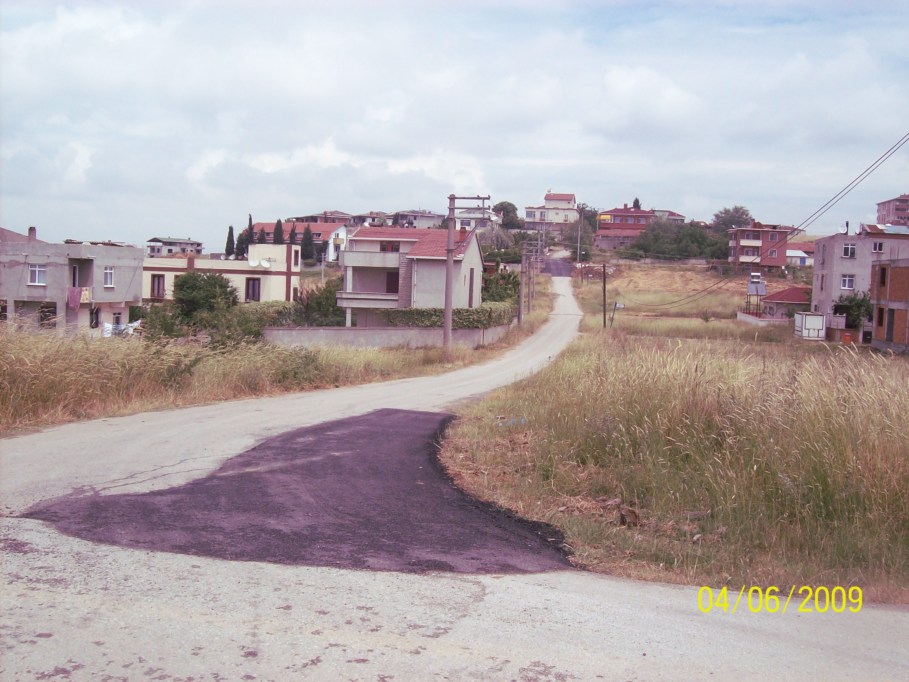 Darıca - Bayramoğlu Karadut Sokak